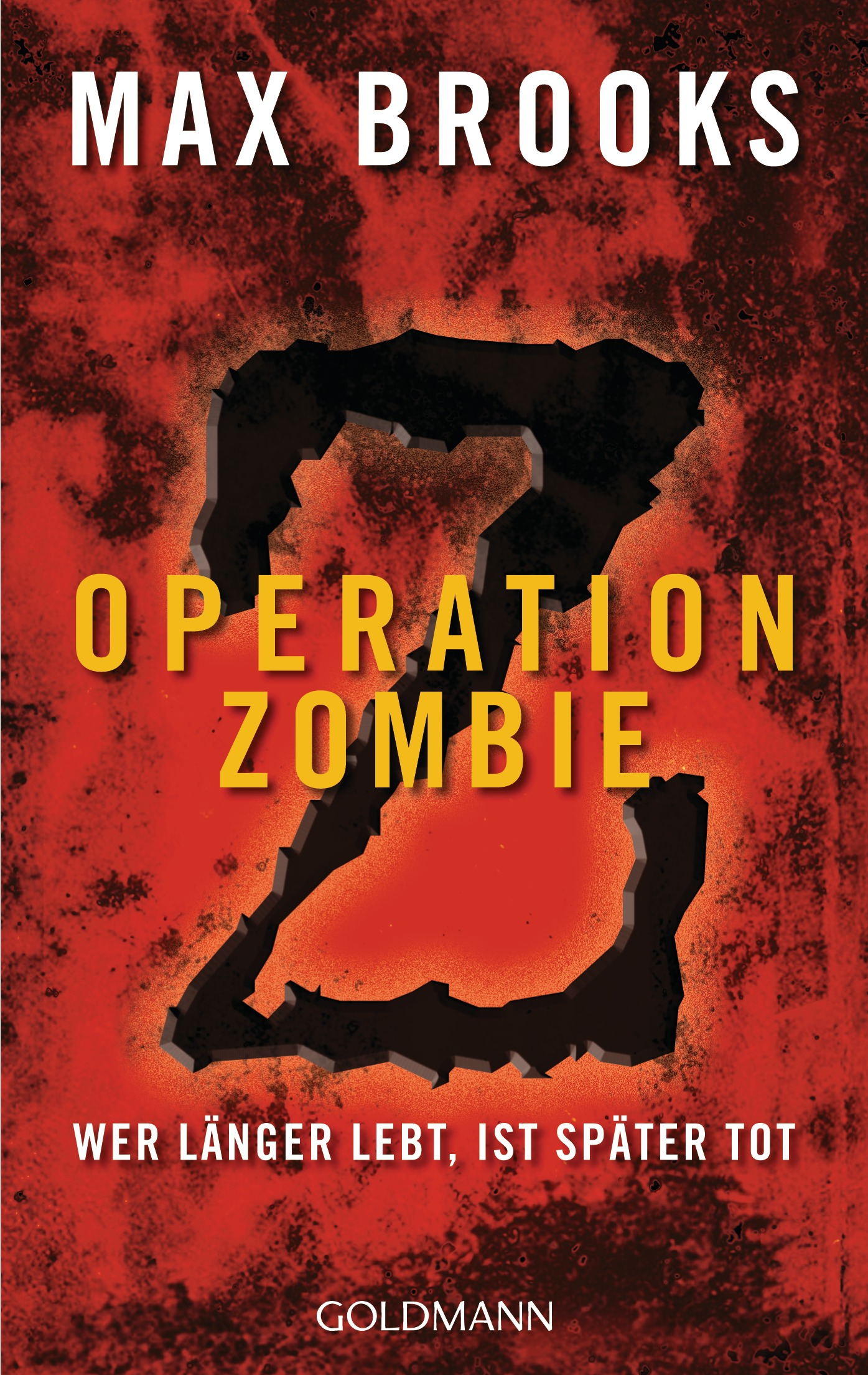 Max Brooks: Operation Zombie. Wer länger lebt, ist später tot. Goldmann, München 2010. DNB